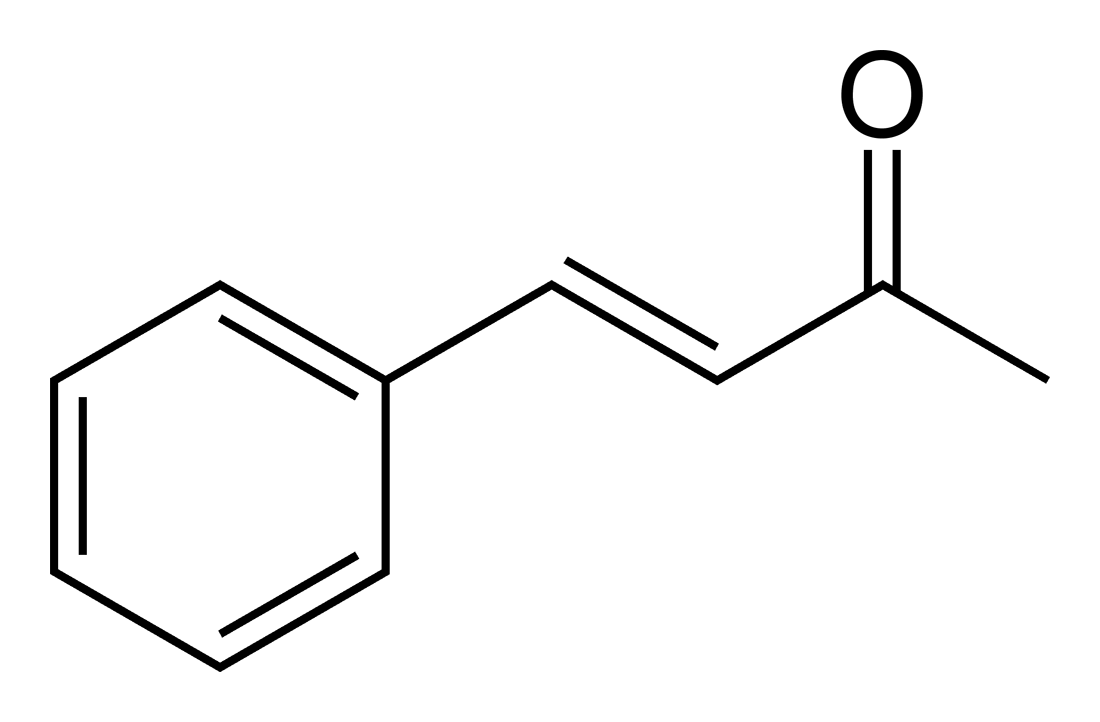 Skeletal formula of benzylideneacetone